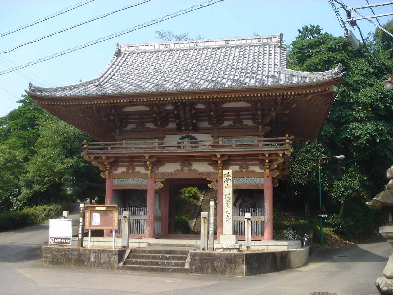 Gokokushiji(Temple)(護国之寺の楼門),Gifu,Gifu,Japan(岐阜県岐阜市)で撮影